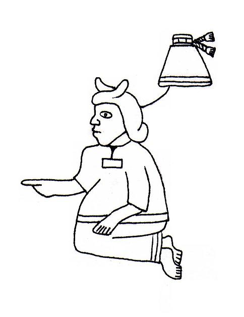 Posible representación de Ilancueitl, basado en imagenes de menor calidad que aparecen en el Códice García Granados, en el Códice Xolotl, en el Códice Telleriano-Remensis y el Códice de Ixhuatépec. She is associated with the first ruler Tenochtitlan and may have even ruled herself.